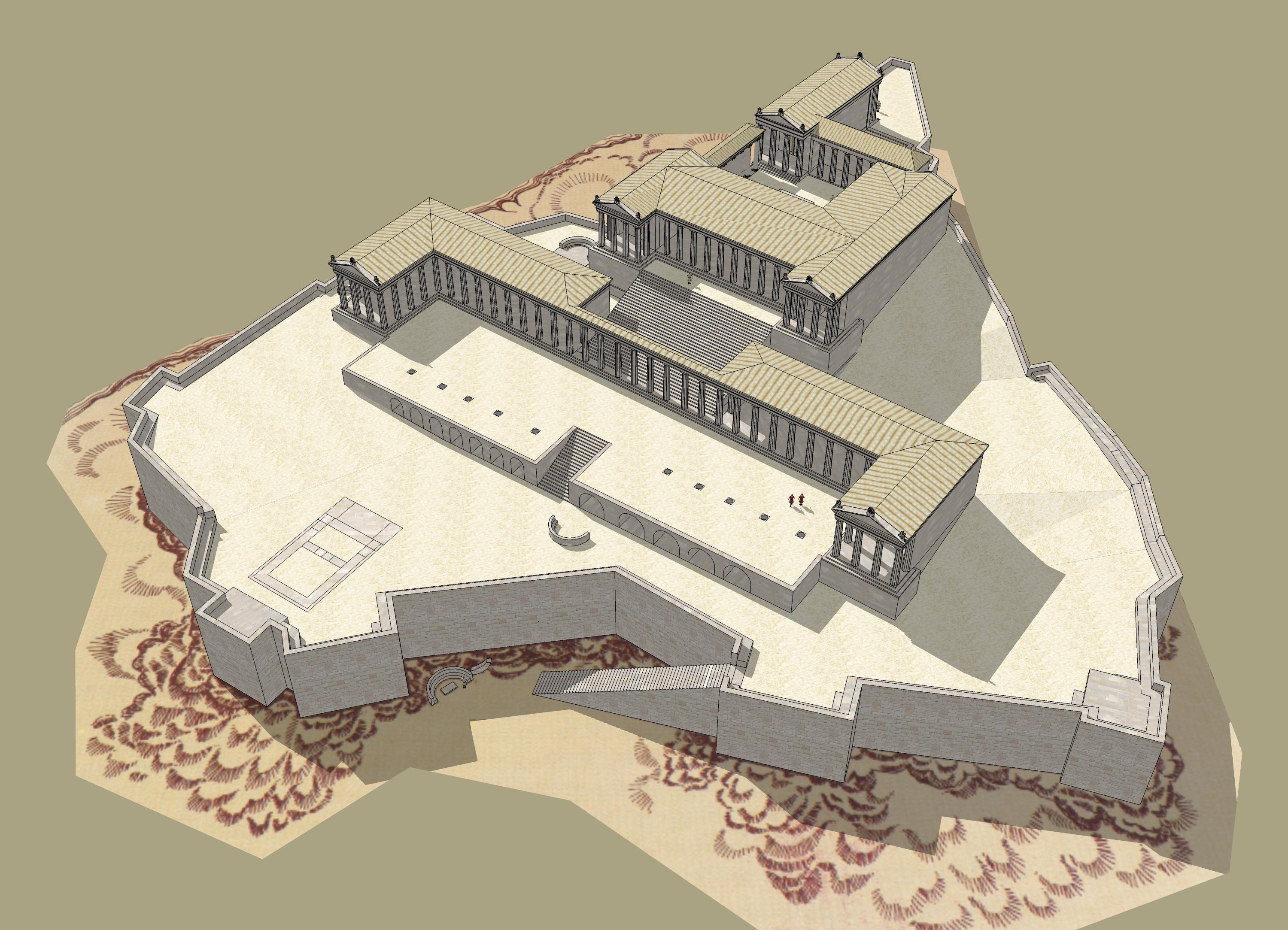 Schéma de l'acropole de Lindos, avec le sanctuaire d'Athéna.